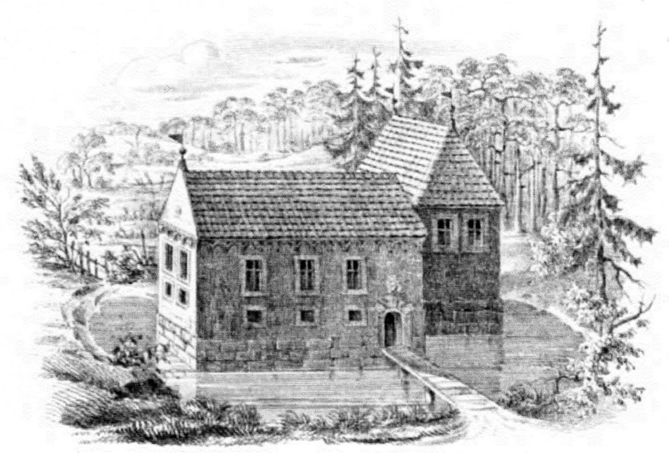 Das alteGutshof Mehlbek um 1550, Zeichnung von Köhler und Roisternitz 1862